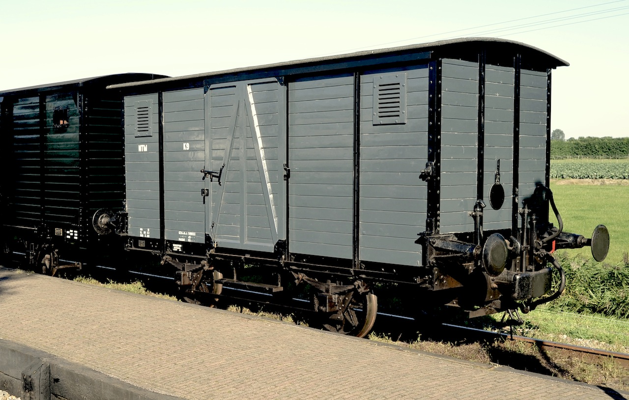 SHM goederenwagen K9 van de Nederlandse Tramweg Maatschappij, te Wognum; 29 september 2013. Foto: Erik Swierstra.